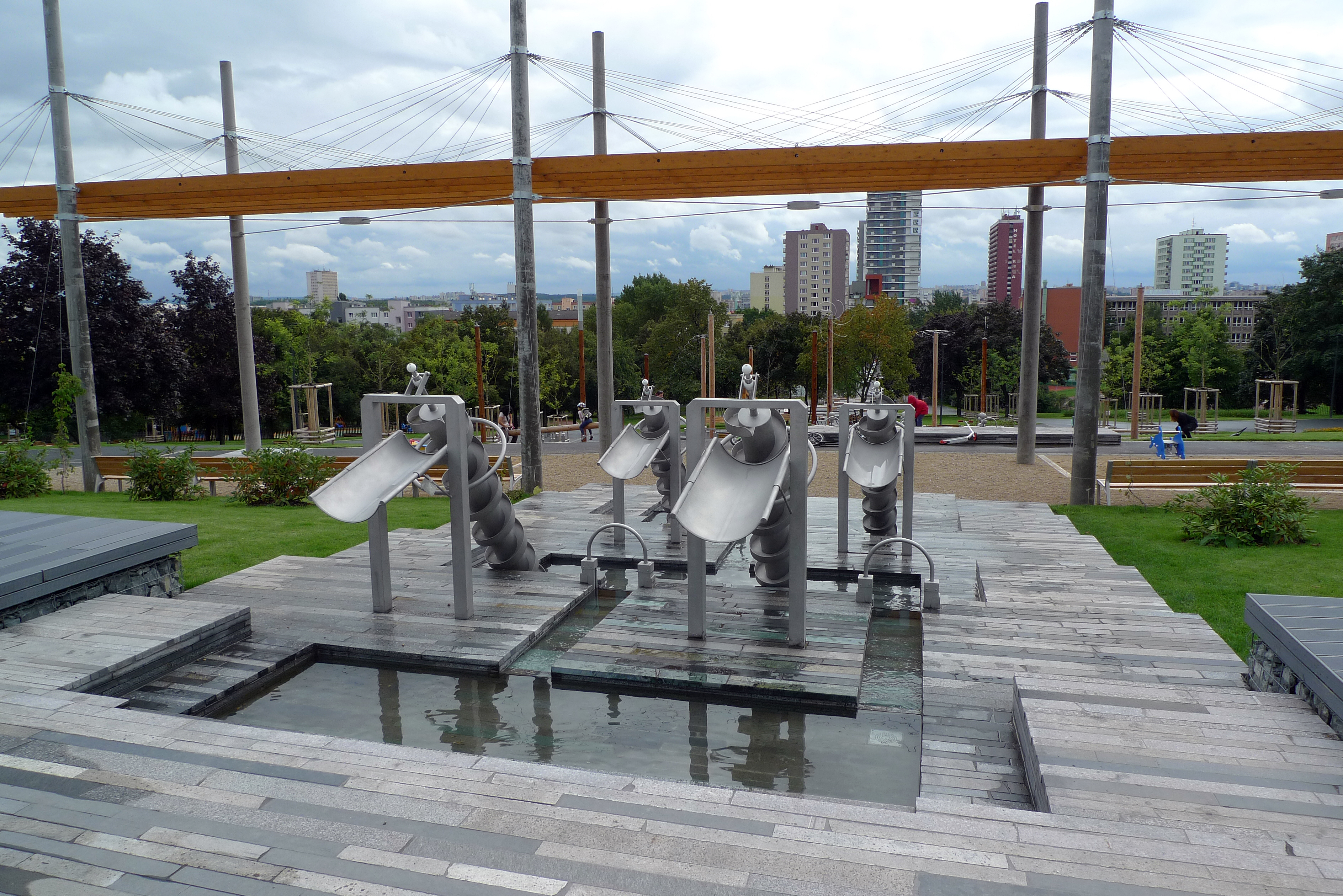 Malešický park v Praze 10 - vodní svět